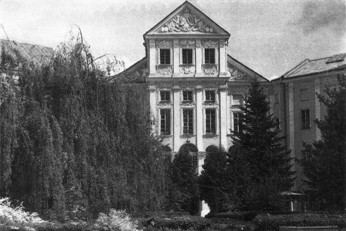 Нясвіжскі палац у савецкі час